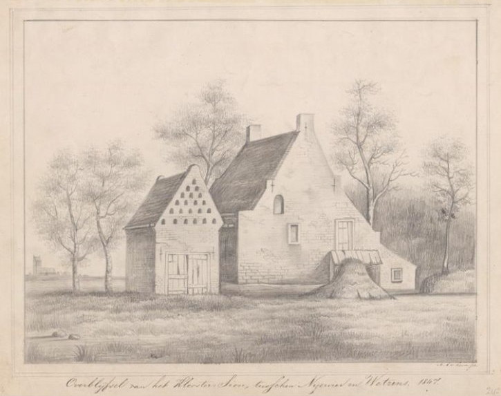 Overblijfsel van het klooster Sion (±1190-1580) te Niawier, Noardeast-Fryslân, Friesland. Tekening van N.A. van Loon uit 1847.